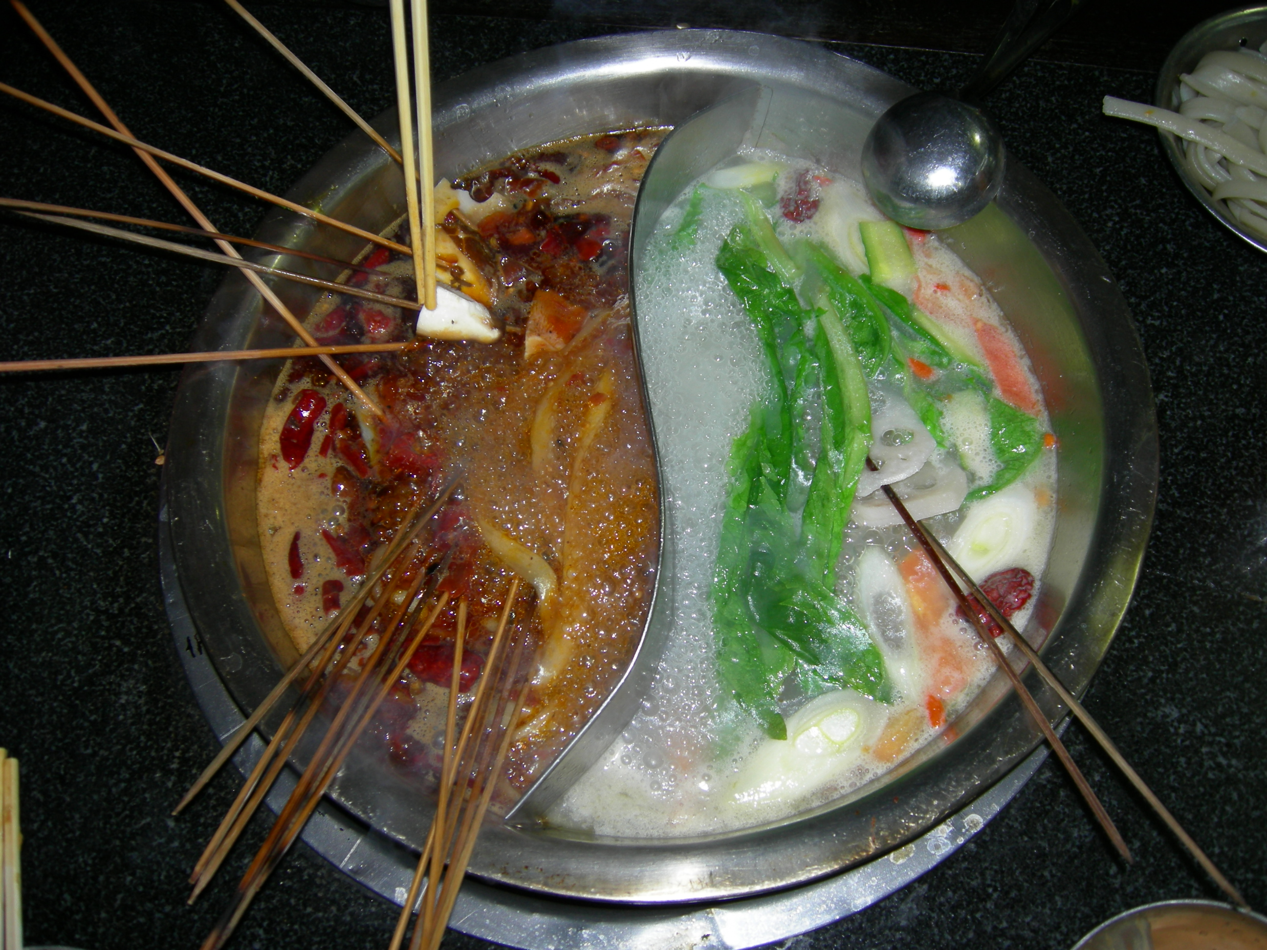 一张关于麻辣烫的照片,摄于西安